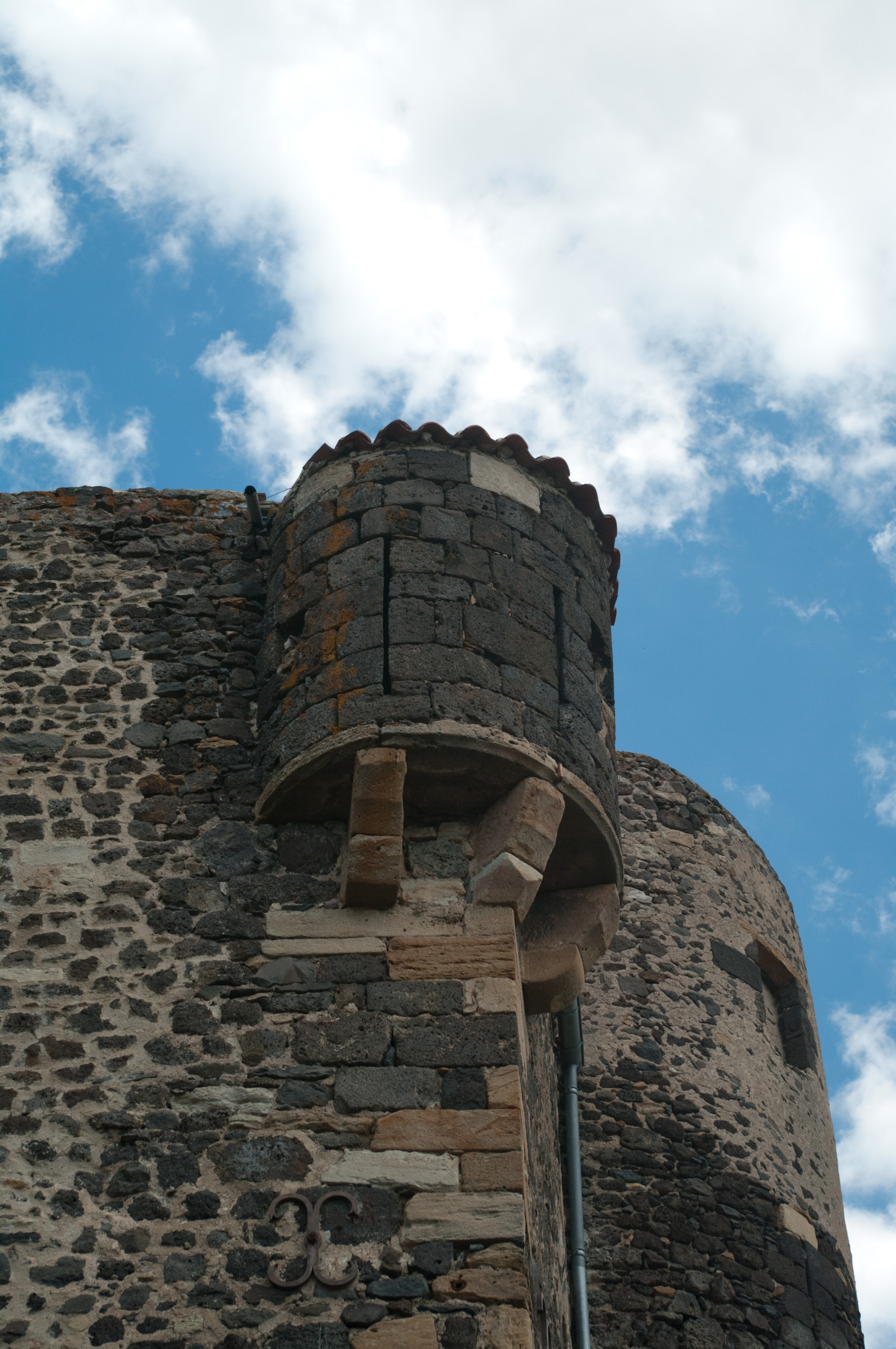 Tourelle du château de Chalus (Puy-de-Dôme, France) .